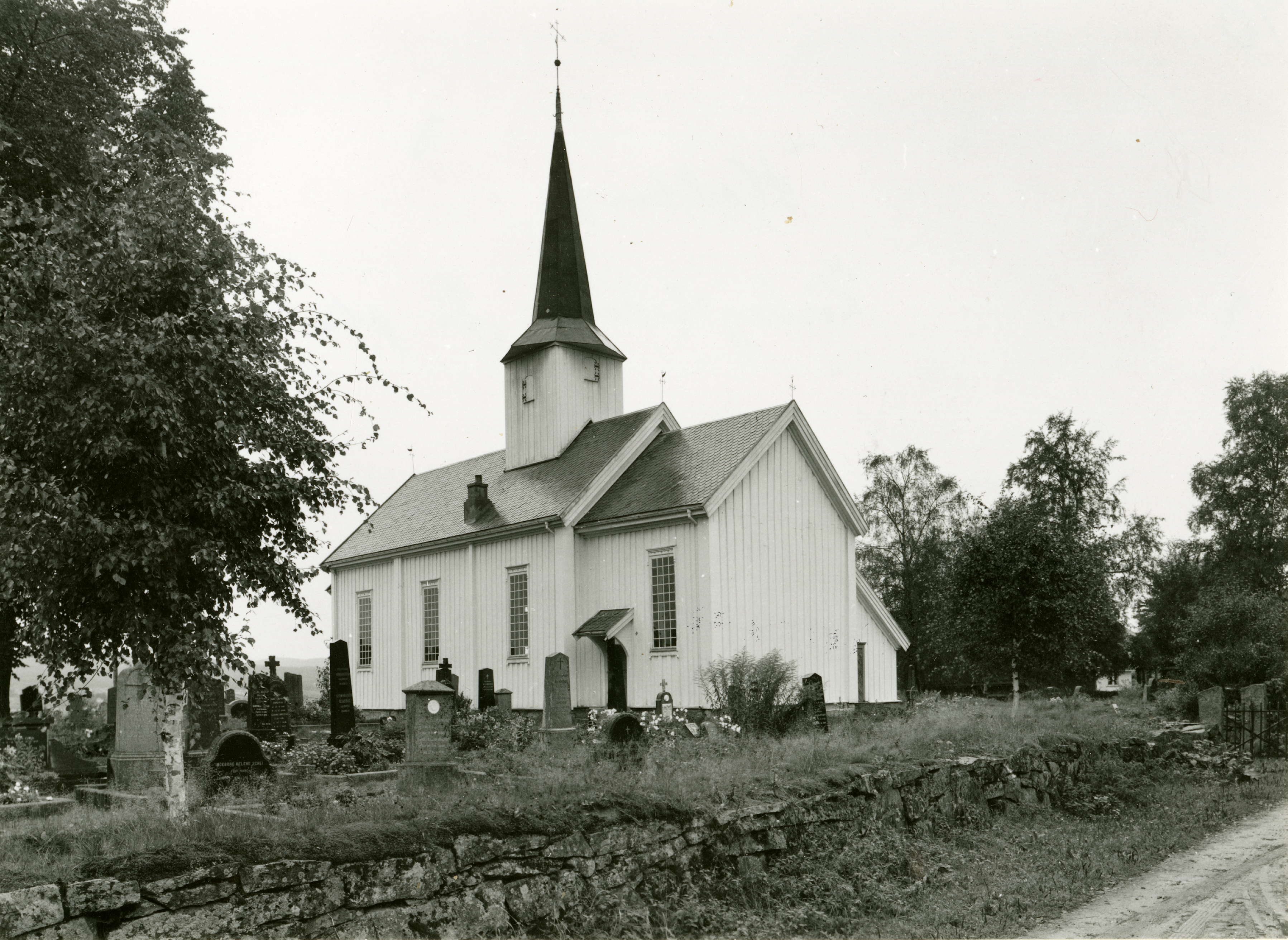 Holter kirke i Holter, Akershus This image on crowdsourcing geotagging platform Fotodugnad